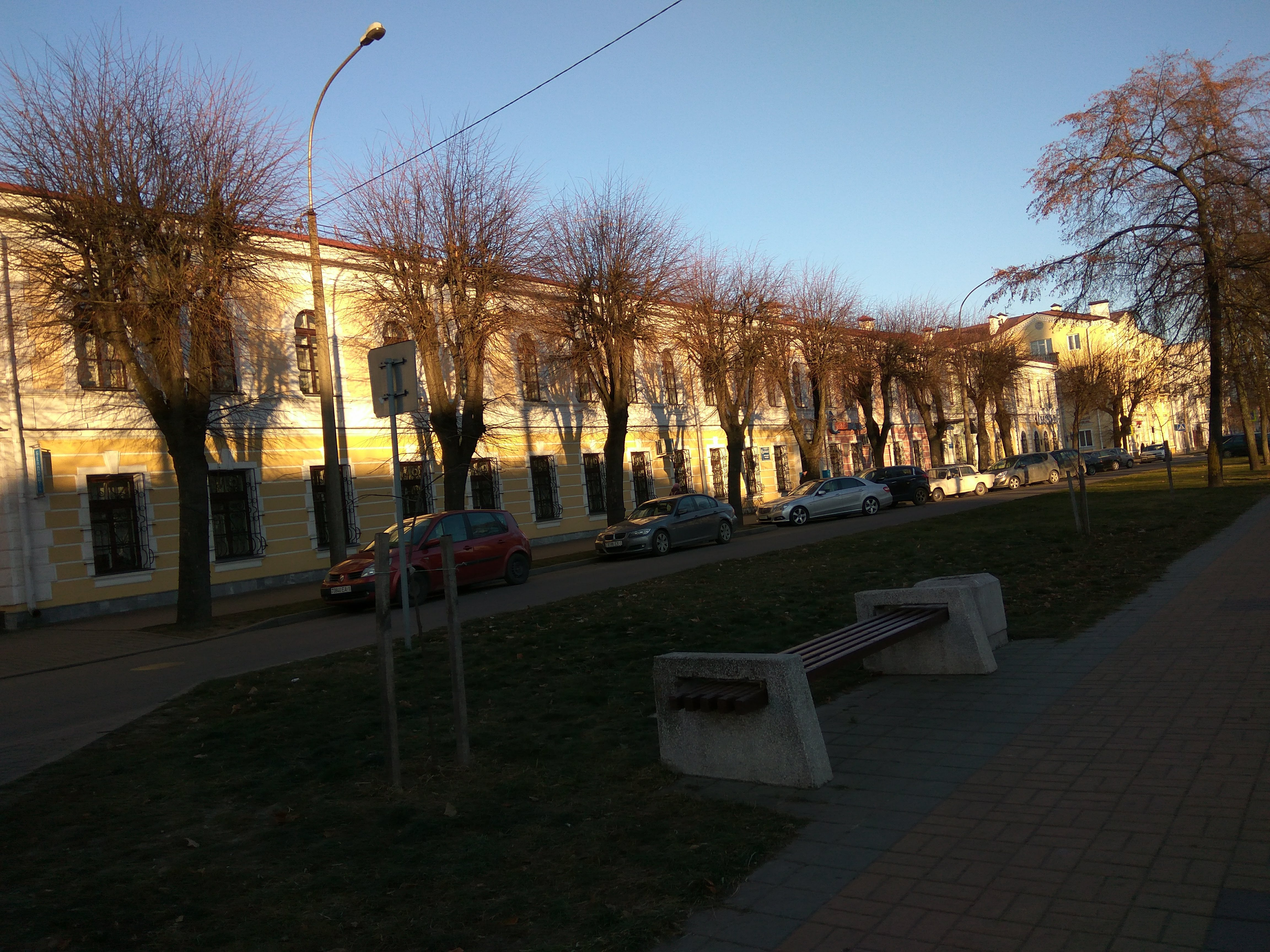 Брэст. Праспект Машэрава